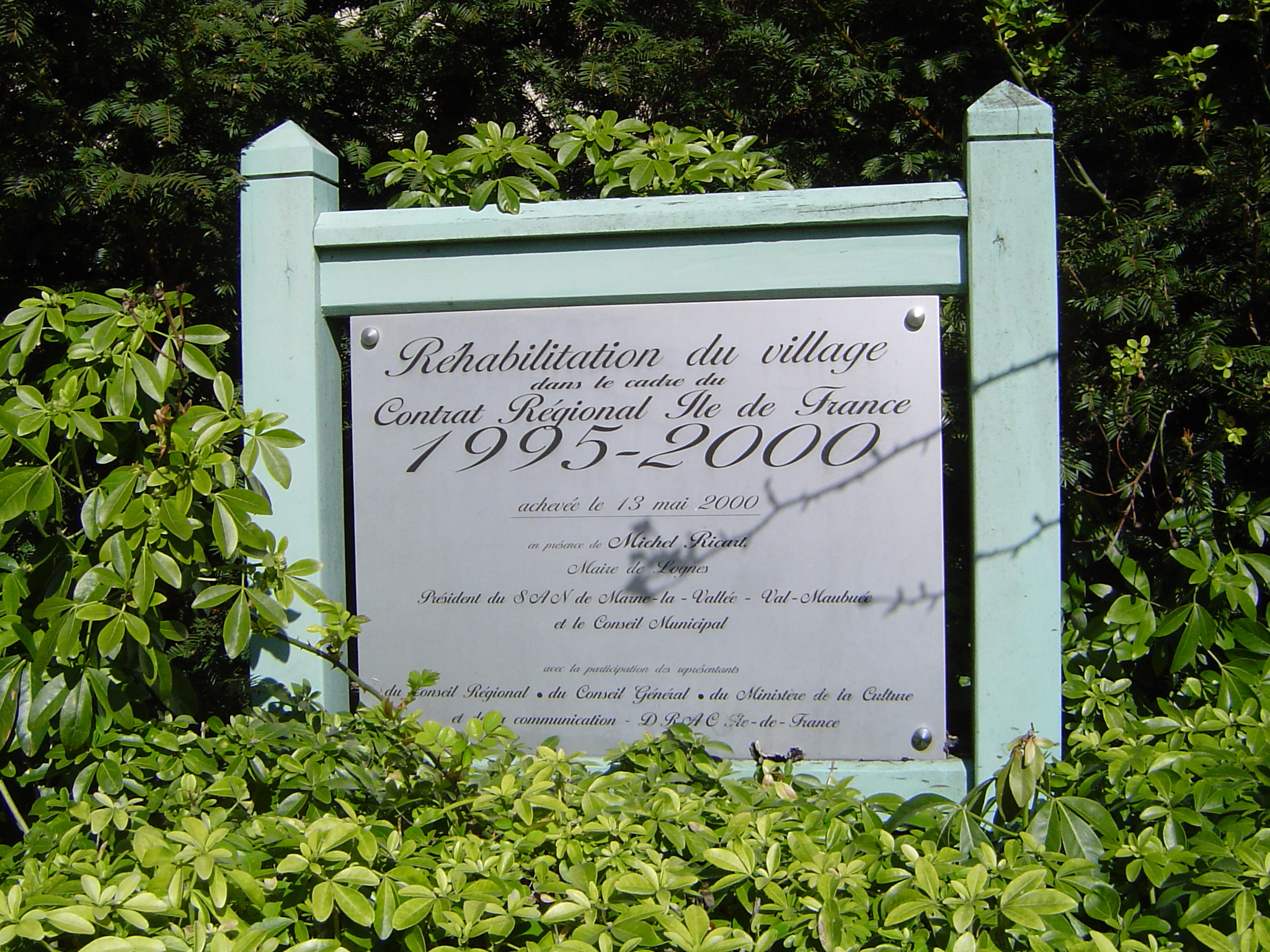 Photos prises à Lognes, commune française de Seine-et-Marne